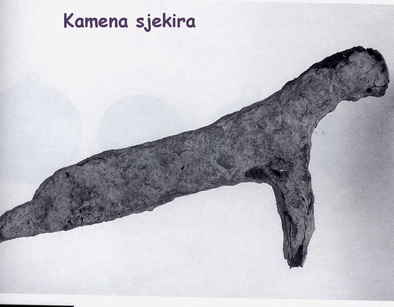 Kamena sjekira iz mlađeg kamenog doba pronađena u Mraclinu.